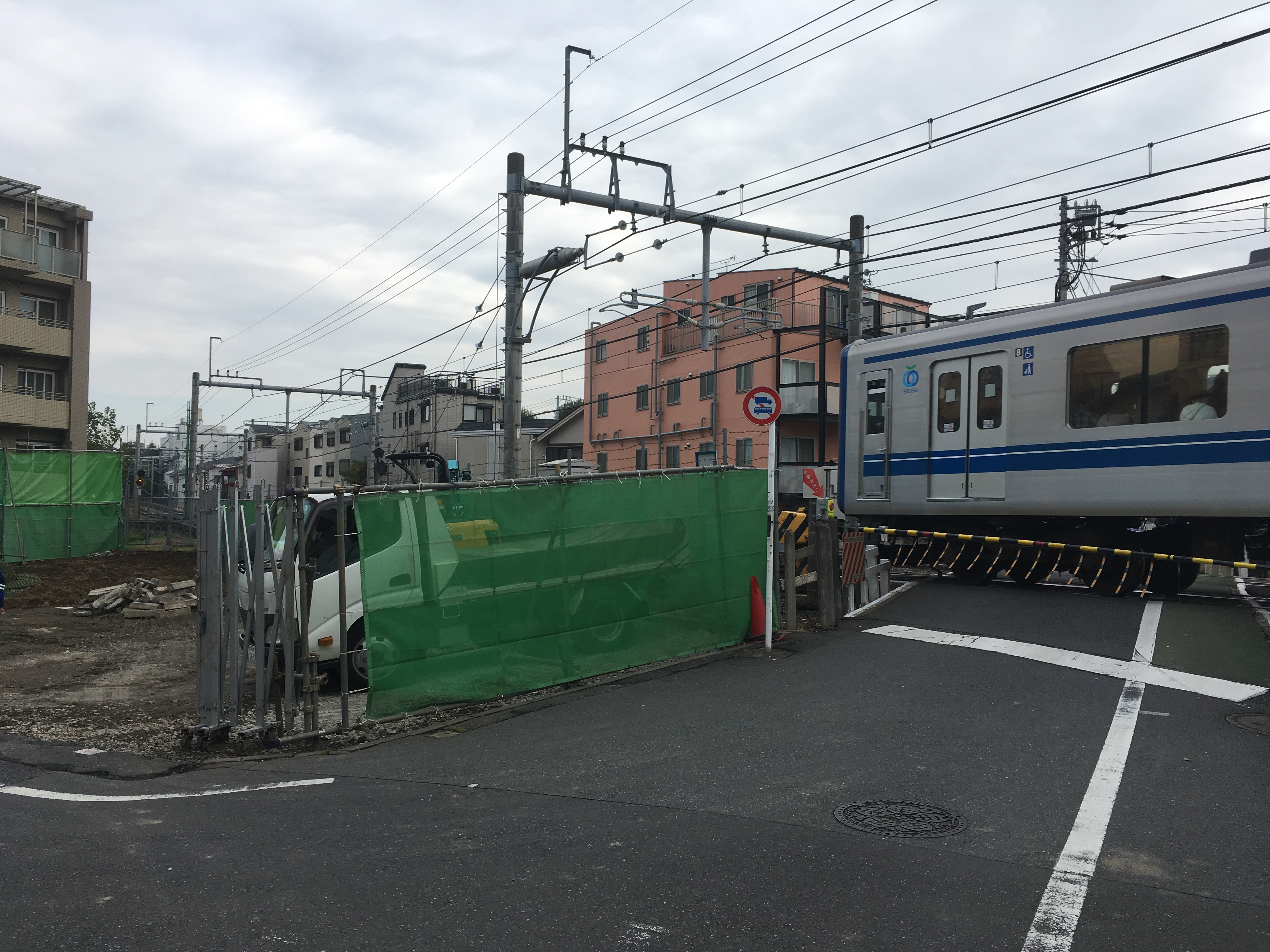 西武池袋線 上り屋敷駅跡